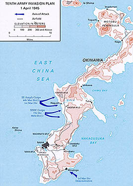 Mappa di Okinawa con le linee generali d'invasione